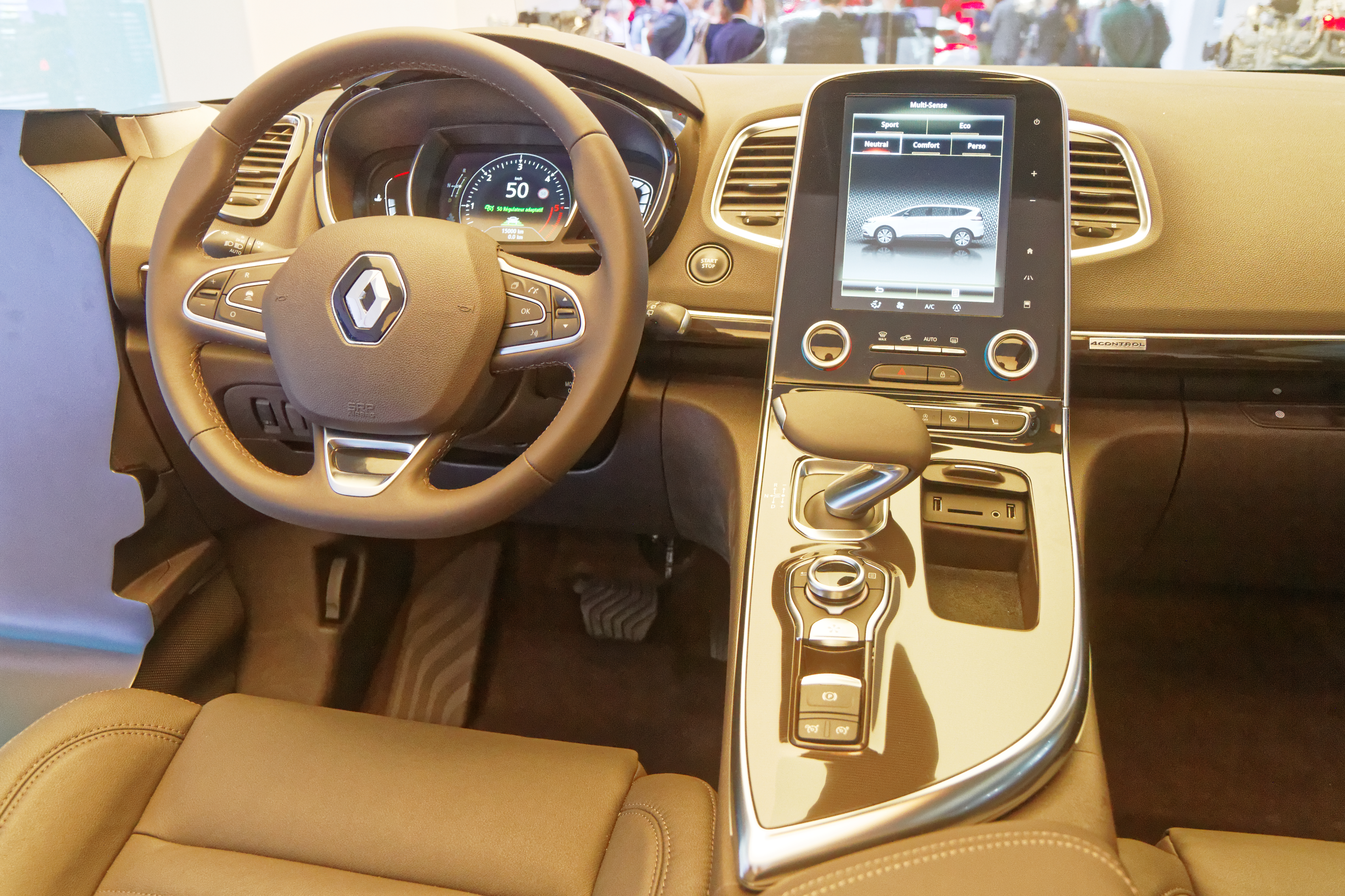 Une Renault Espace présentée lors du mondial de l'automobile de Paris 2014.